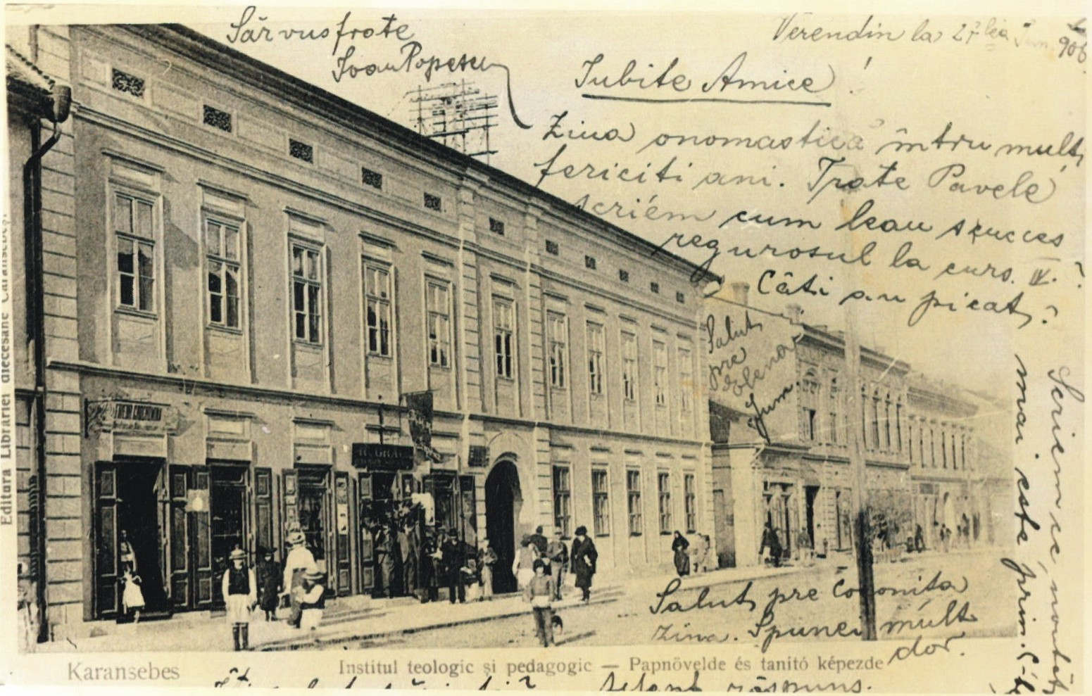 Clădirea Intitutului pedagogic-teologic din Caransebeş.